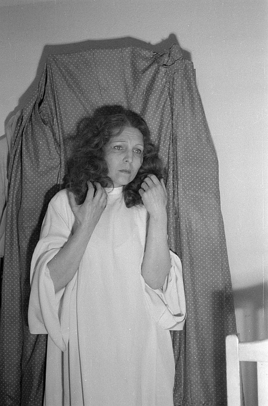 Original image description from the Deutsche Fotothek Szenenbilder